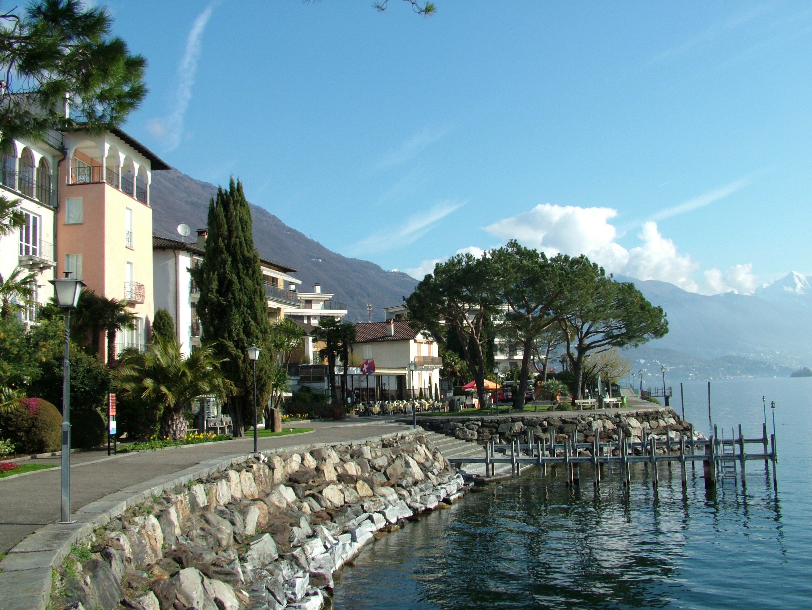 Brissago, Schweiz, Tessin, die Uferpromenade